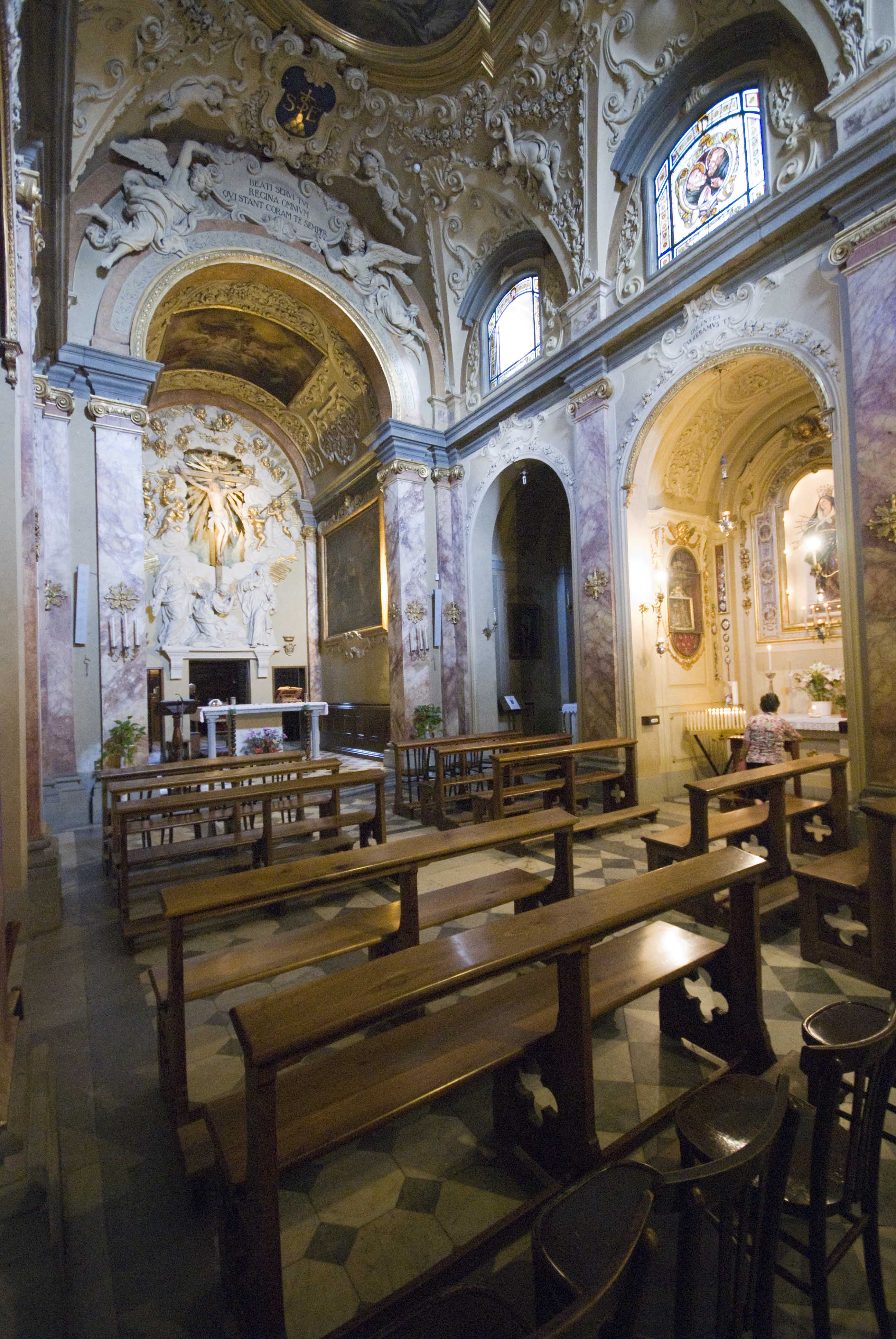 interno della chiesa di montesenario